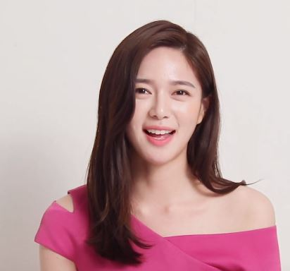 2019년 배우 이엘리야가 실큰 코리아의 새로운 뮤즈로 발탁되었습니다. 새로운 모습으로 선보이는 실큰의 모습과 이엘리야의 활동도 많은 기대 부탁드립니다.